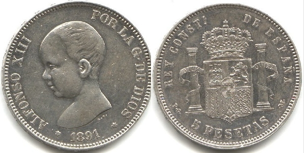 5 pesetas